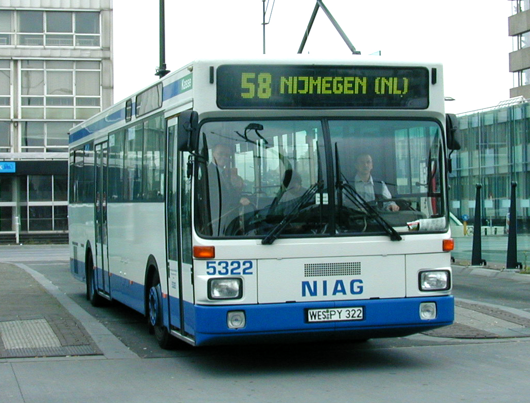 Niederrheinische Verkehrsbetriebe (NIAG) bus 5322 van het type MAN SL 202 te Nijmegen.